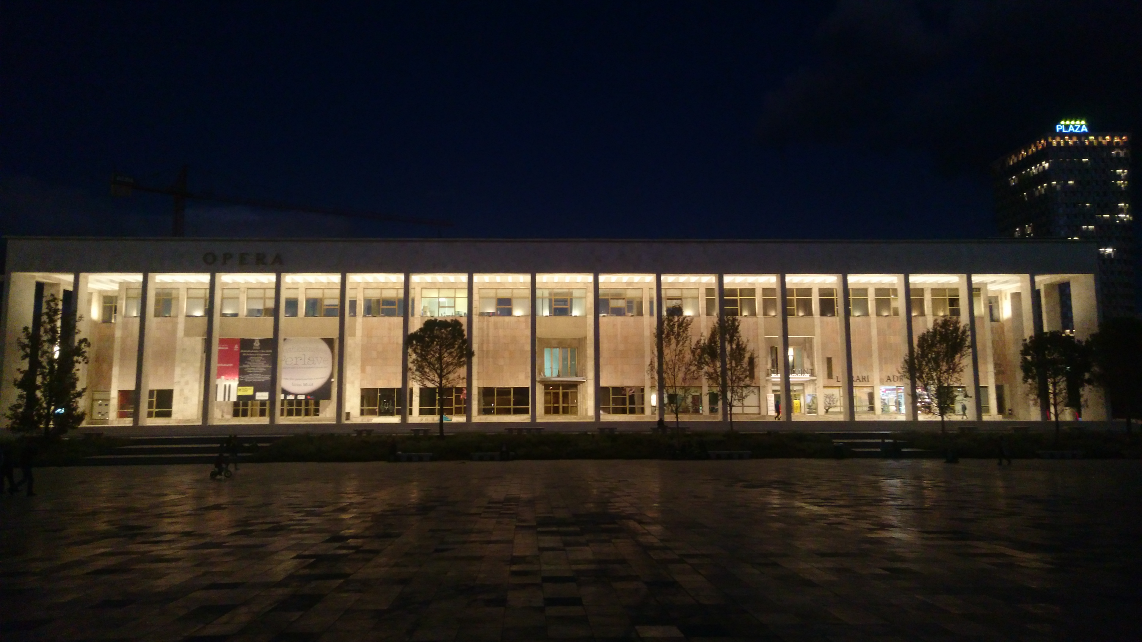 Pamje e Operas e marrë nga sheshi Skënderbeu